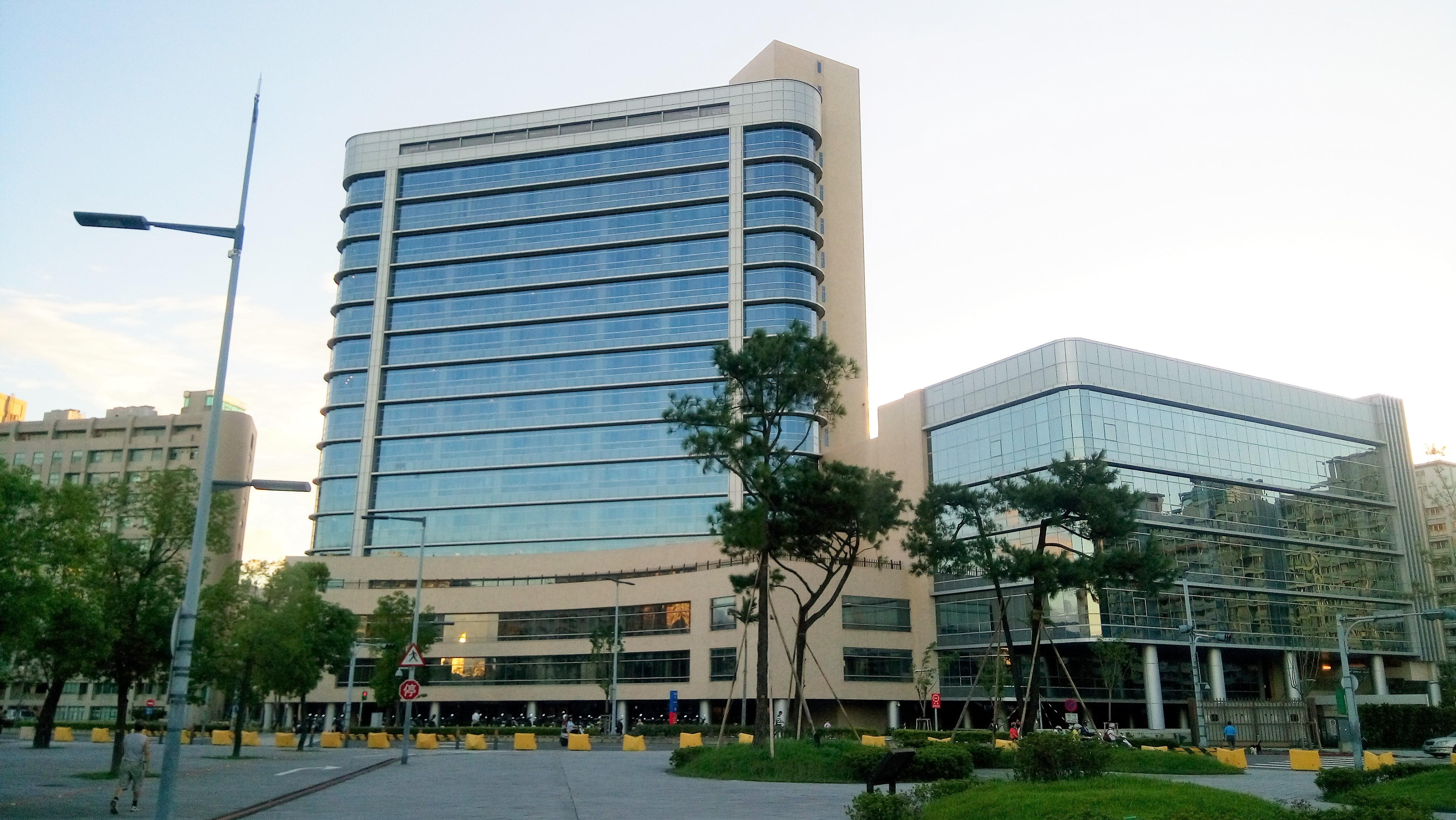 Tpark園區內的板橋亞東醫院是新北市首屈一指的醫學中心